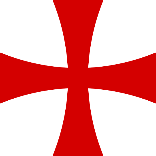 Emblème du Popolo de la république de Volterra